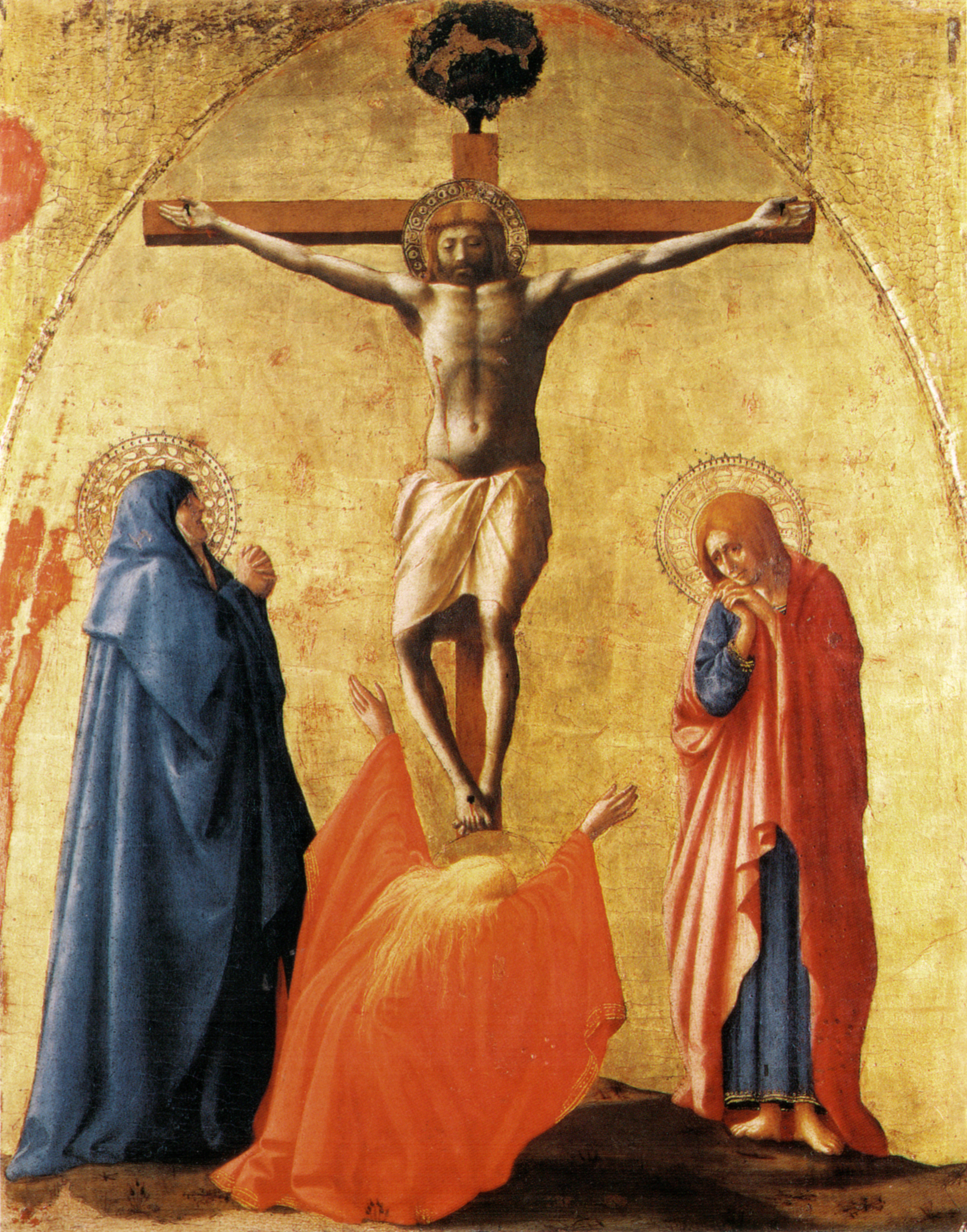 polittico di pisa